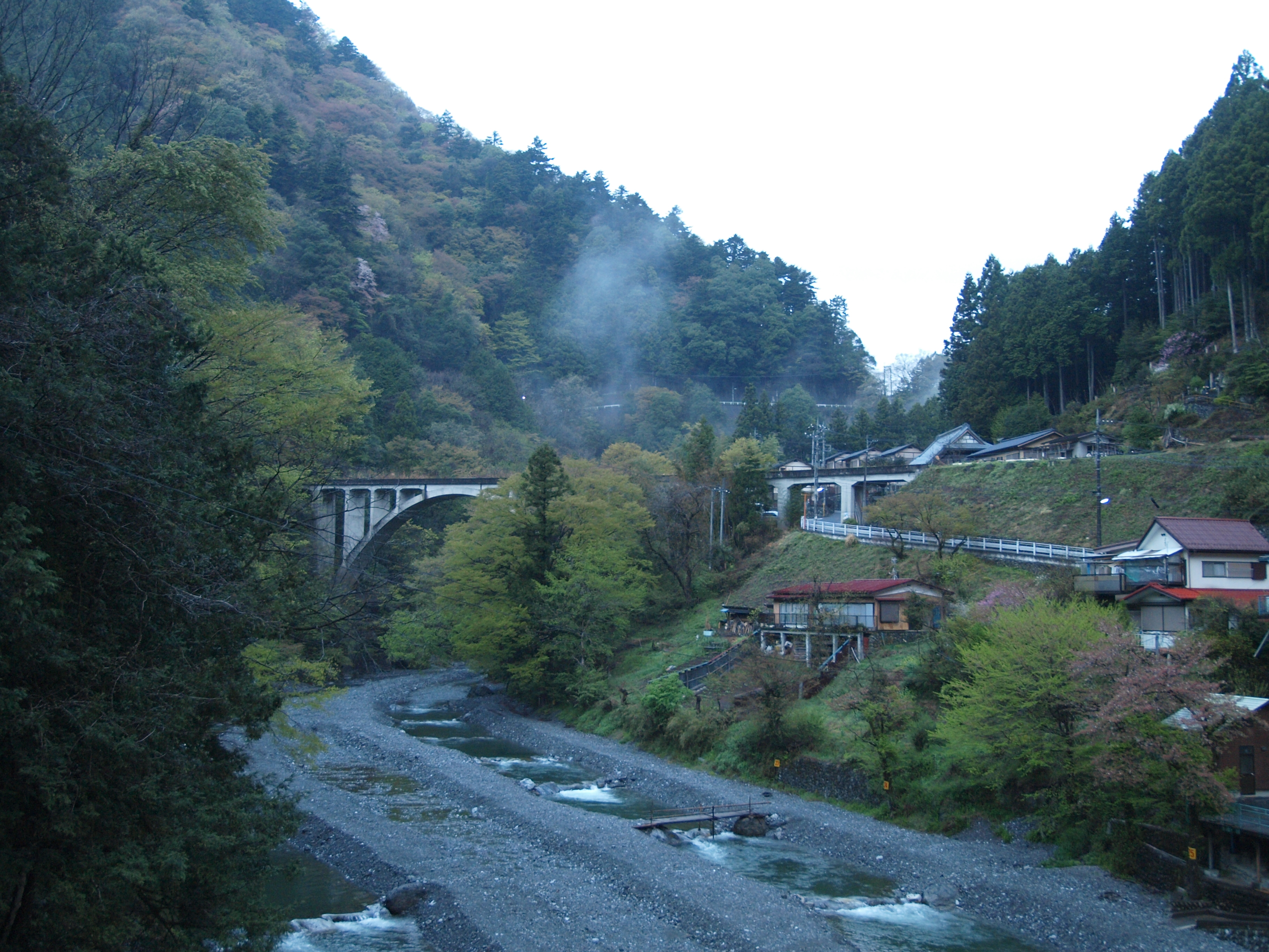 Okutama , Tokyo